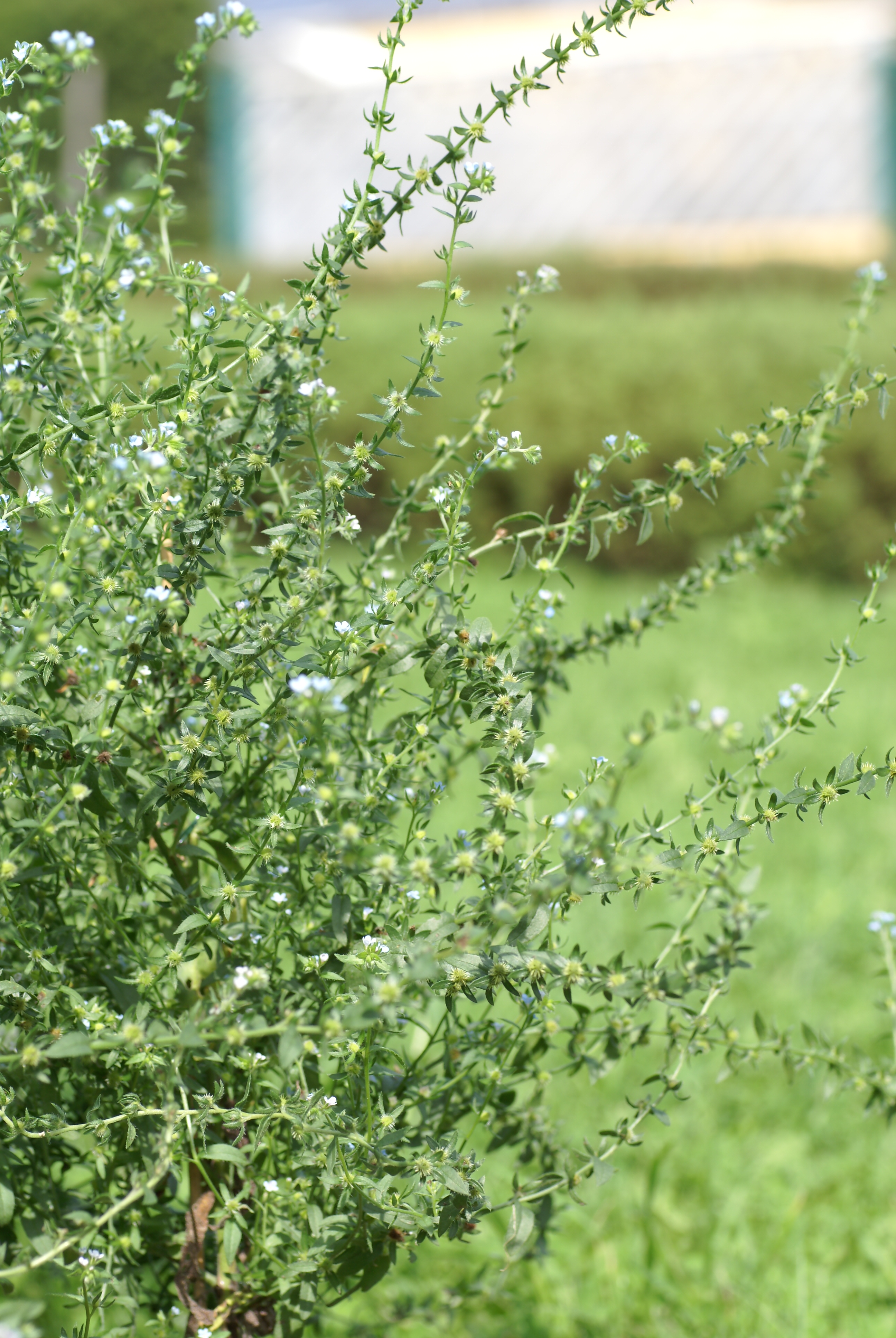 Plant species Lappula squarrosa shot in Bergianska trädgården in northern Stockholm